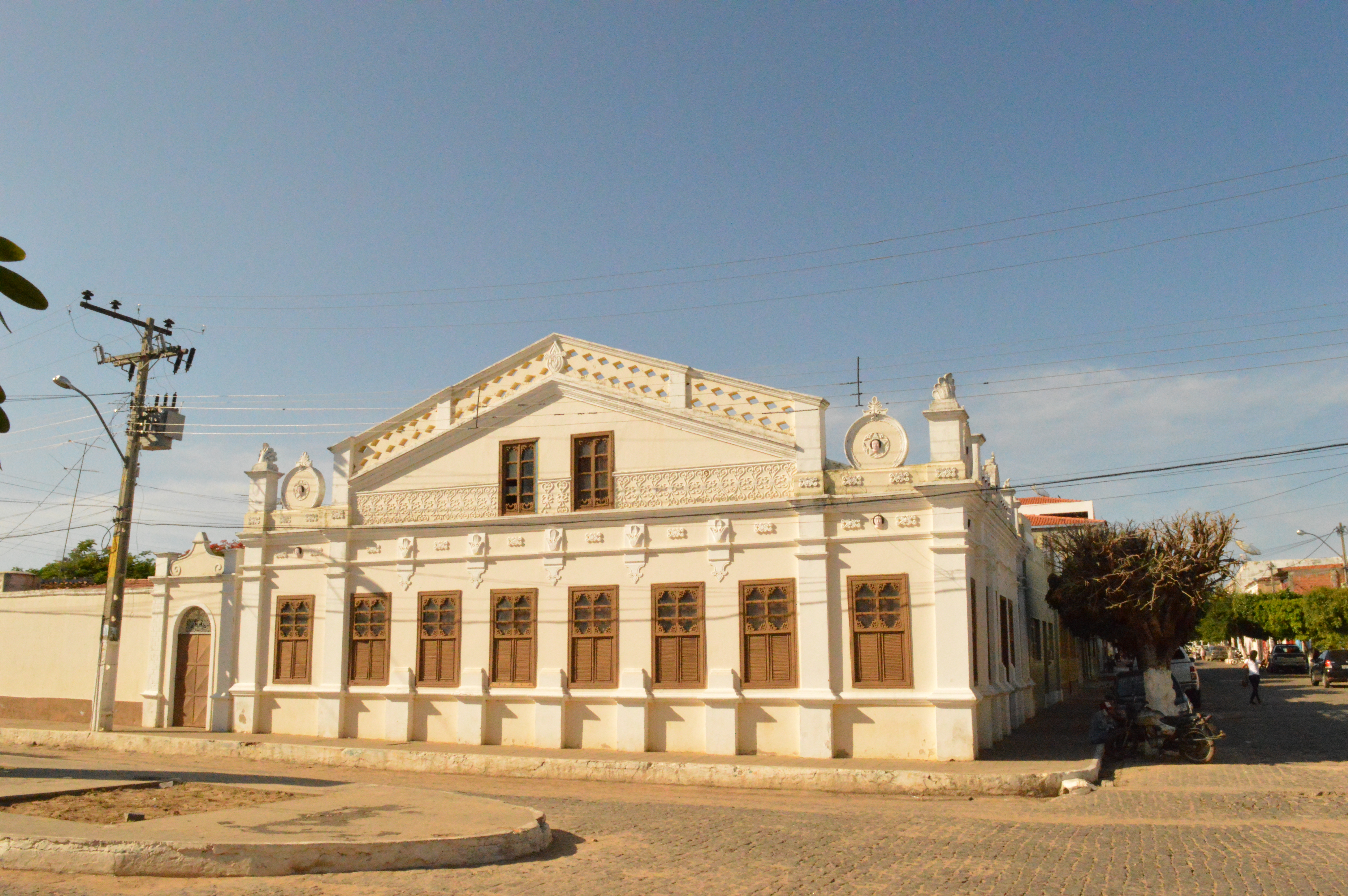 Casarão localizado na esquina da Rua Marechal Deodoro da Fonseca com a Estrada para o Cais em Paratinga. Foto de 16 de janeiro de 2017.